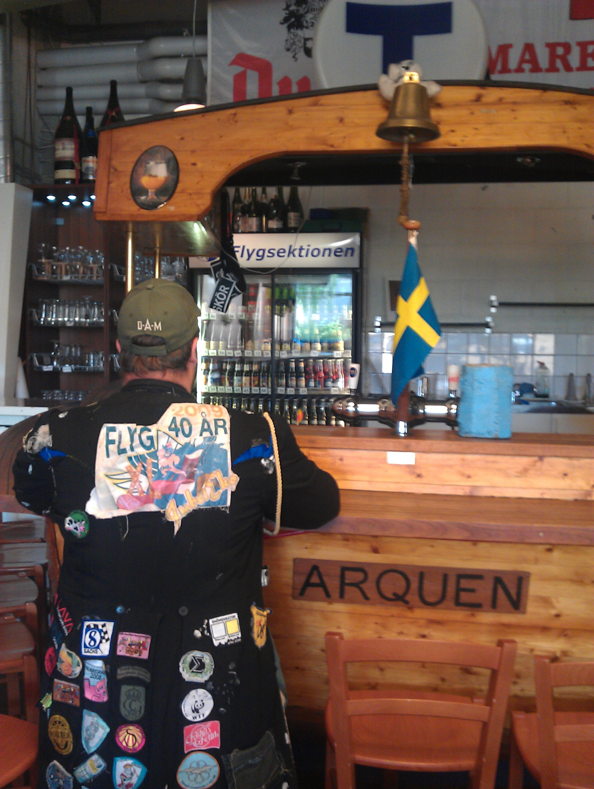 student iförd b-frack